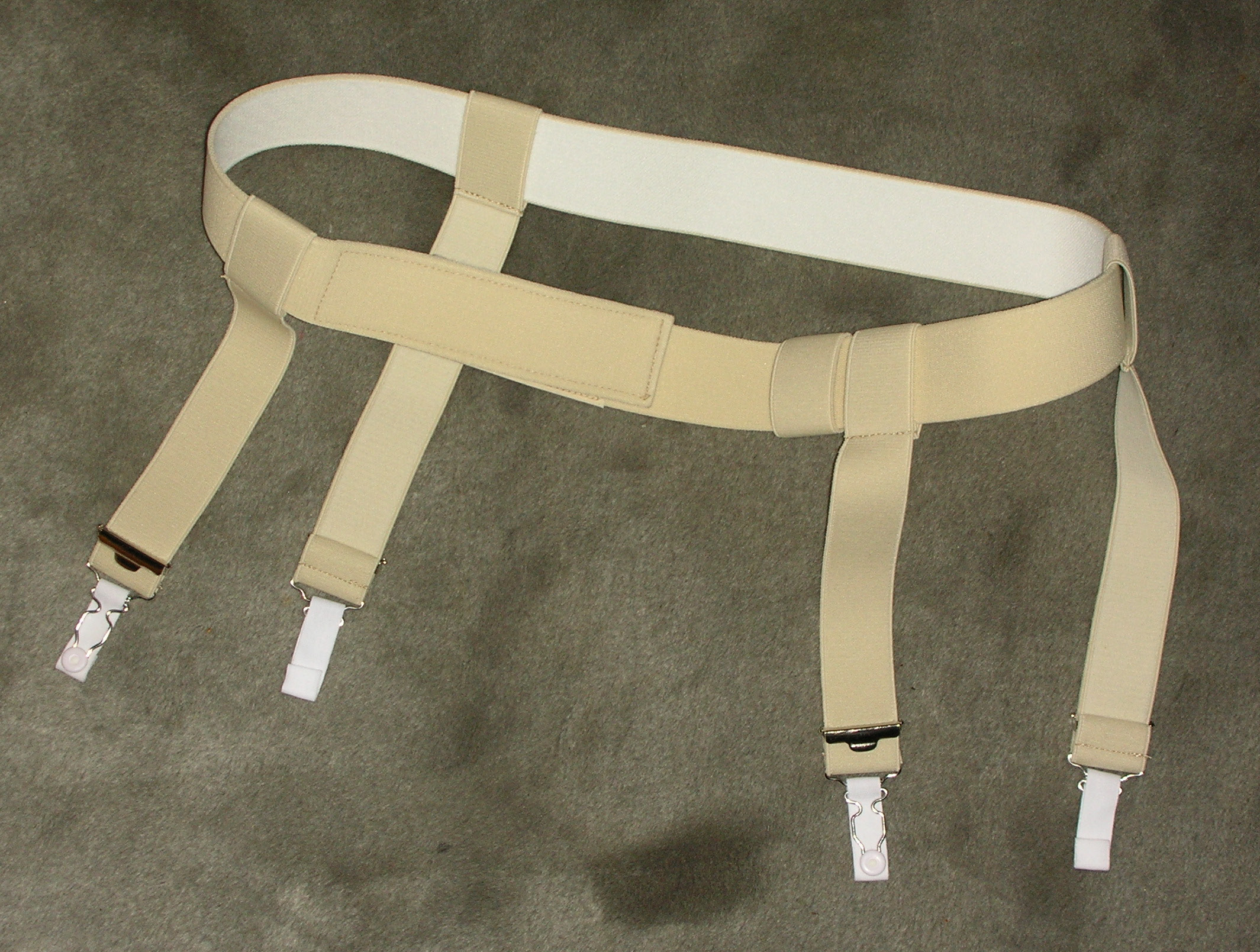 Gürtel mit Strumpfhaltern für Kompressionsstrümpfe